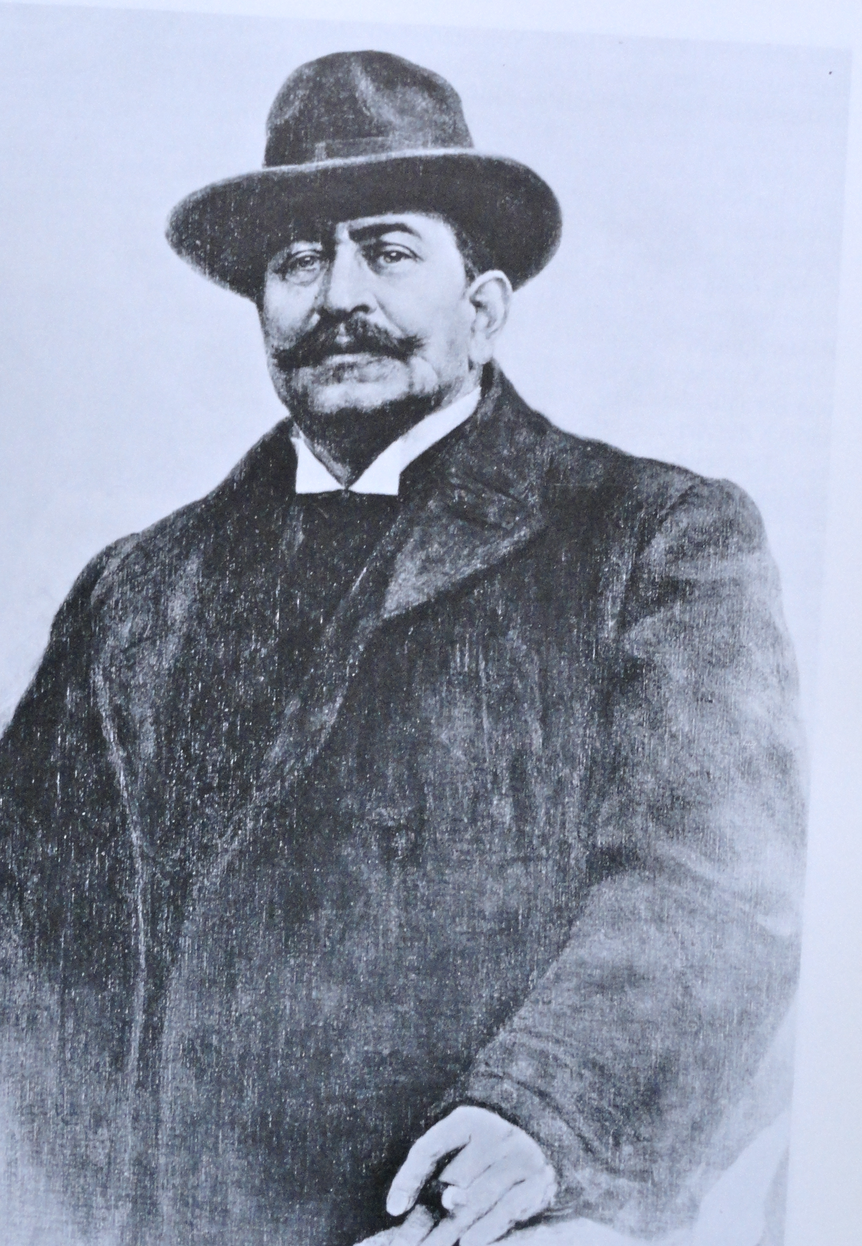 Alexander Seiler (Hotelier) (1864–1920)